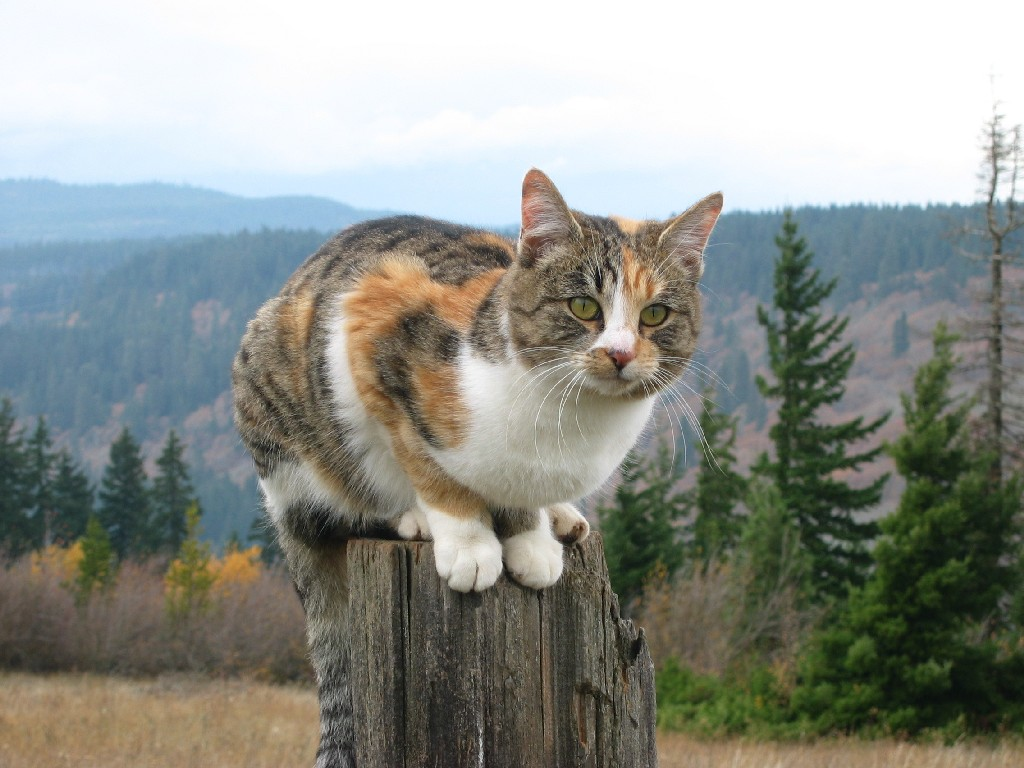 Coca